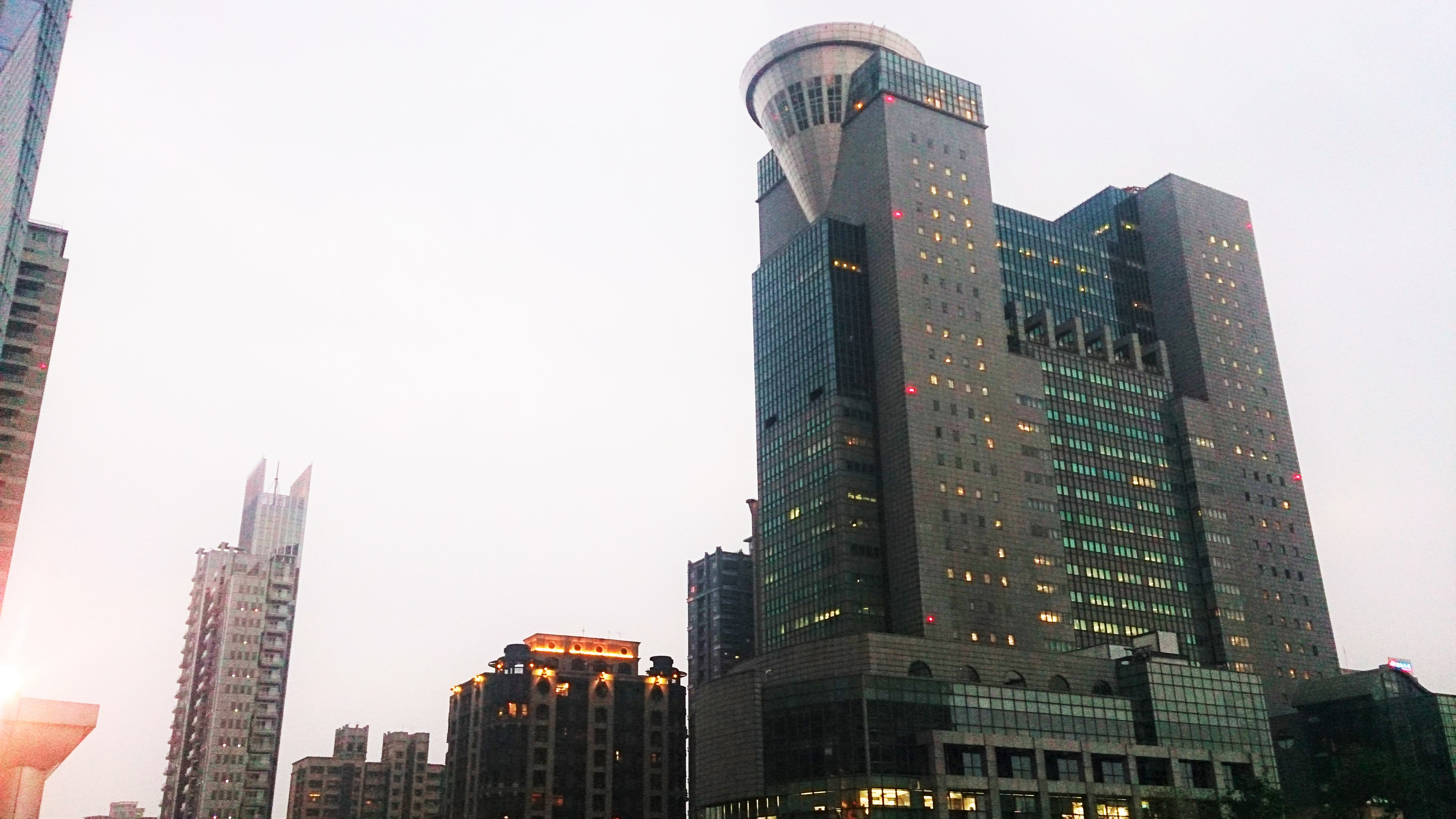 新板特區的新北市政府大樓是全台最高的公務建築